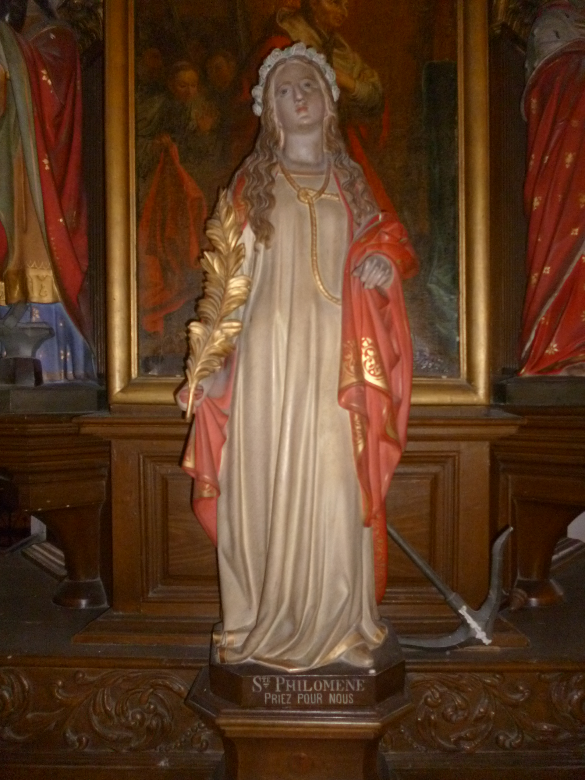 Statuette de Sainte Philomène dans l'église Sainte-Marie-Madeleine à Maignelay-Montigny (60).